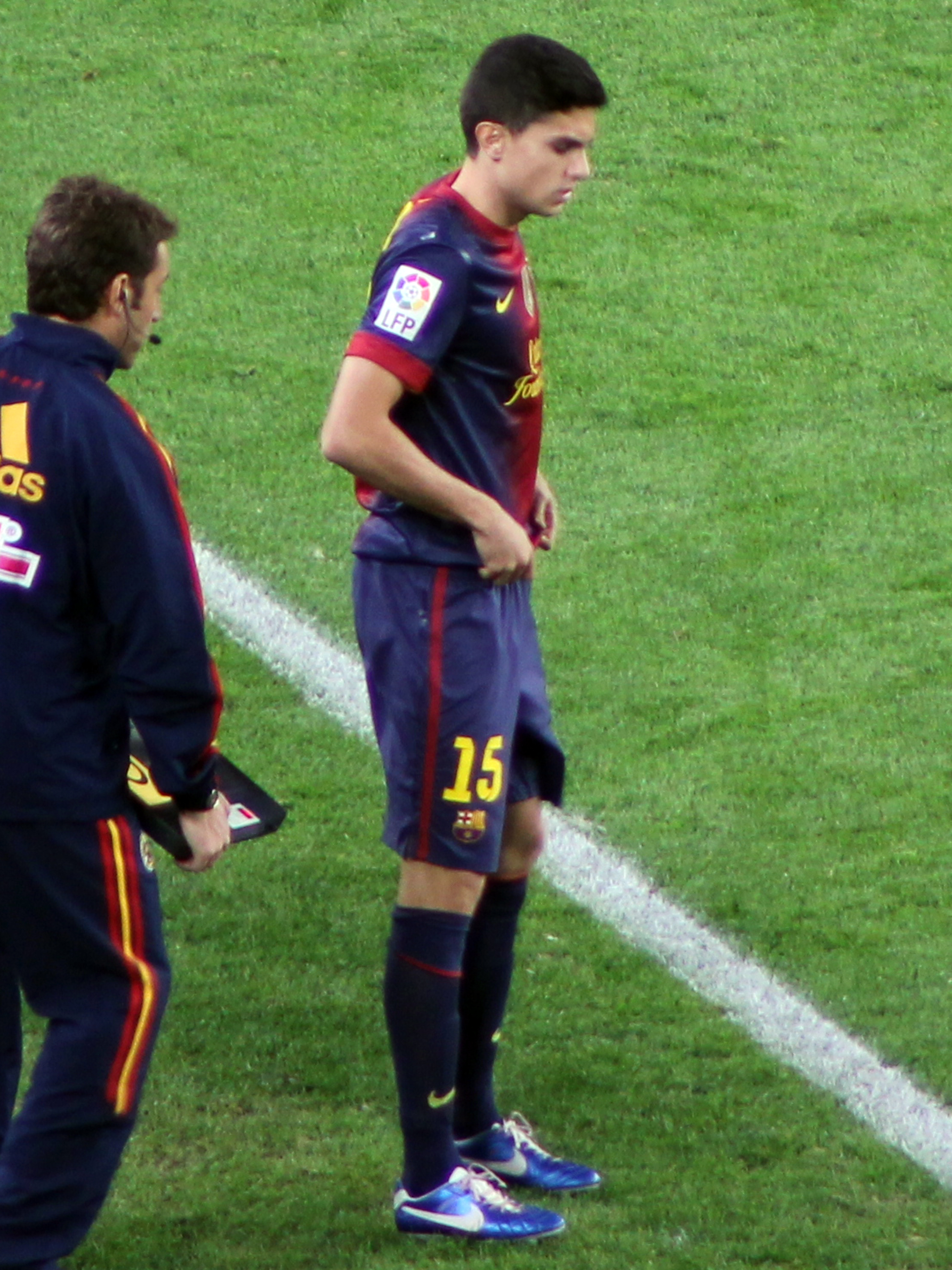 Marc Bartra con la camiseta del FC Barcelona, en un partido de dieciseisavos de Copa del Rey contra el Alavés, en el Camp Nou.